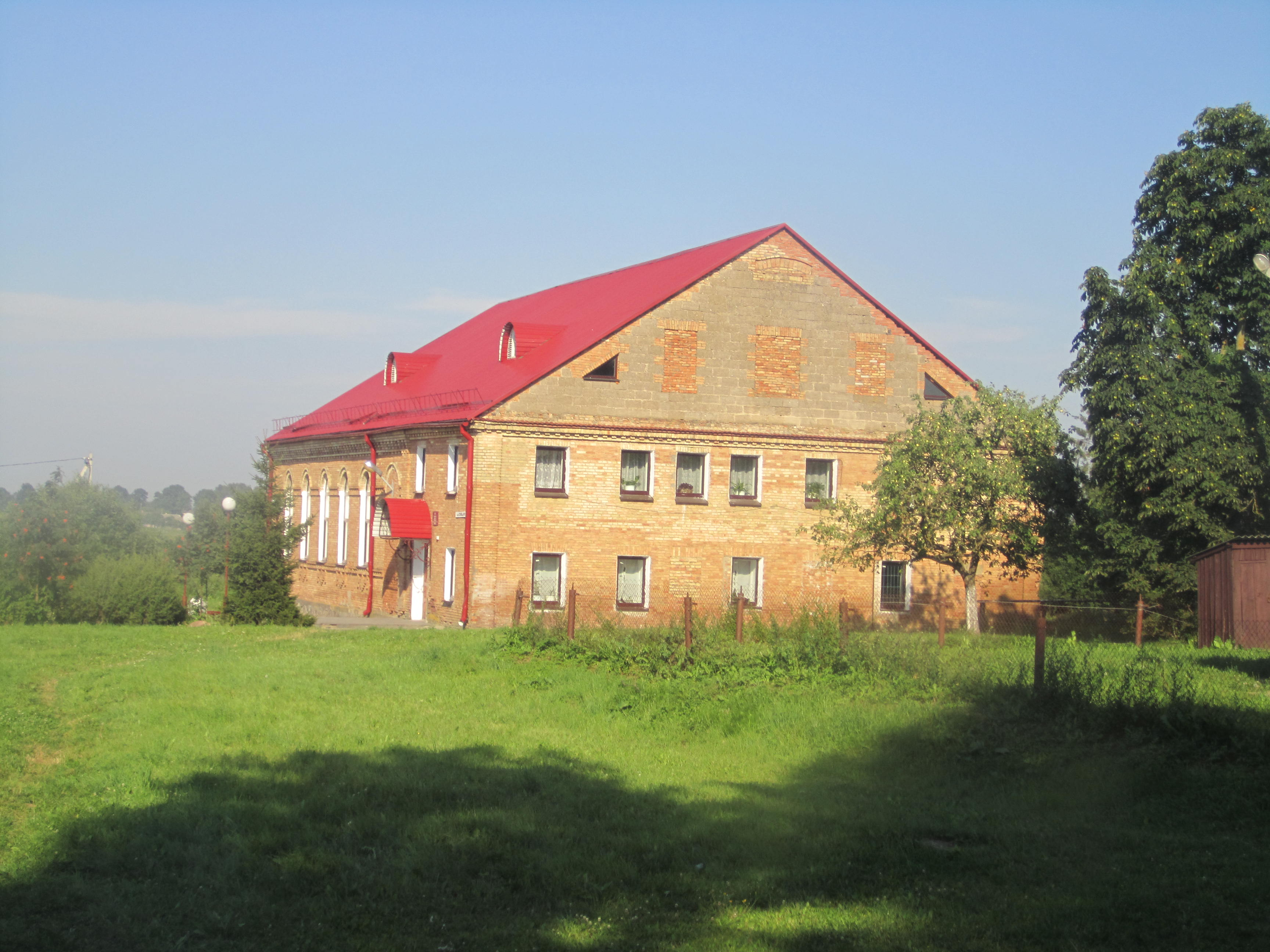 מבנה ישיבת ראדין